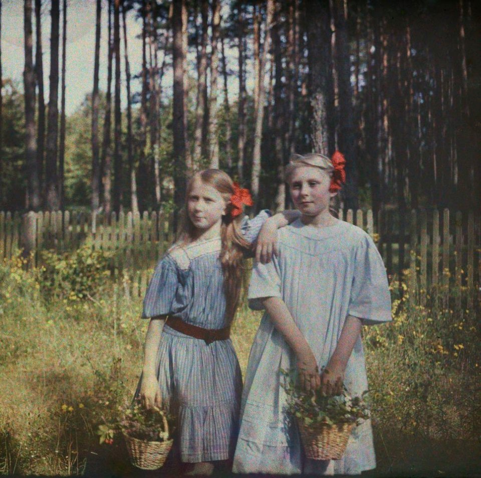 Anna Iwaszkiewicz z Marią Wysocką, prawdopodobnie pierwsze kolorowe zdjęcie na polskich ziemiach, maj 1909